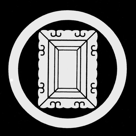 丸に額、小出氏ほかが使用